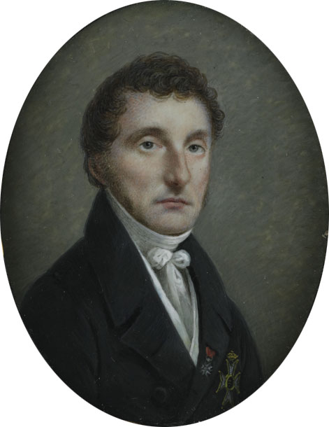 Portret van de hoogleraar Pieter de Riemer (1769-1831)